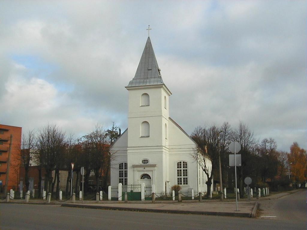 Rīga, Daugavgrīvas Baltā luterāņu baznīca 2002-11-03